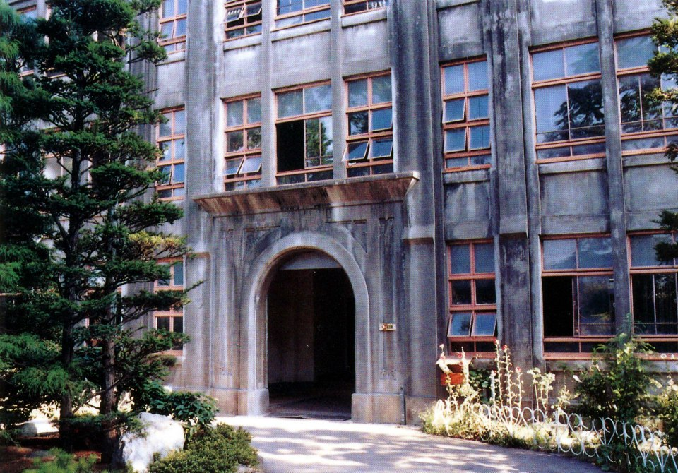 松本県ヶ丘高校旧本館正面玄関